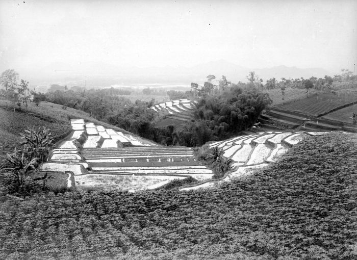 Negatief. Cassave en rijstvelden, Tjisaroea